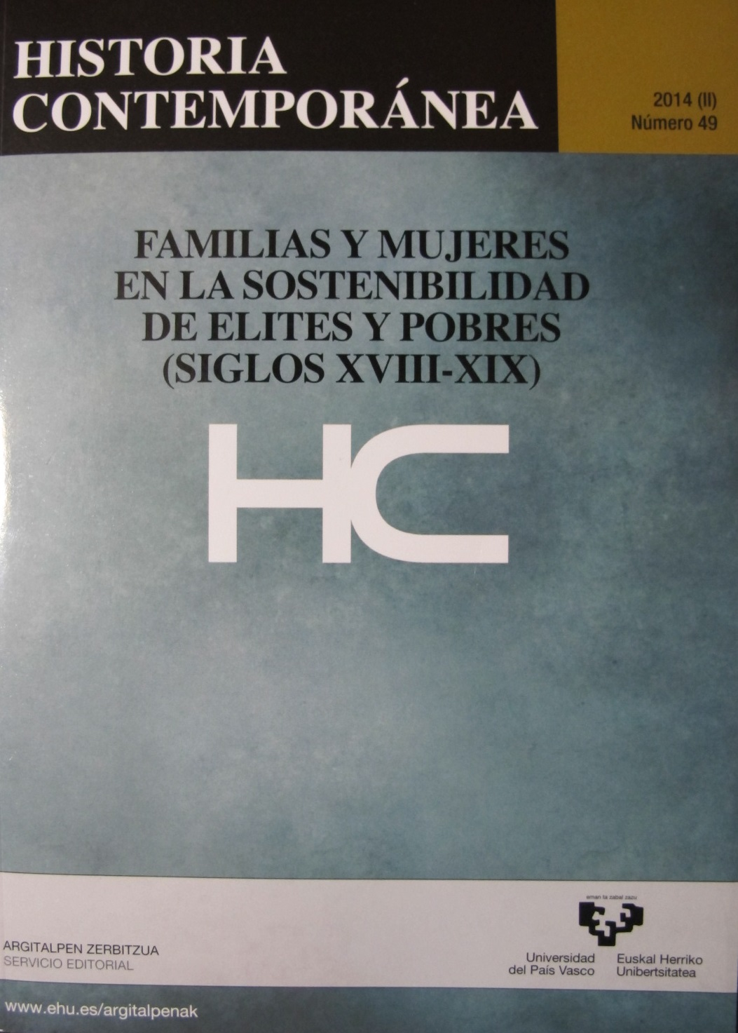 Historia Contemporánea, nº 49 (2014)